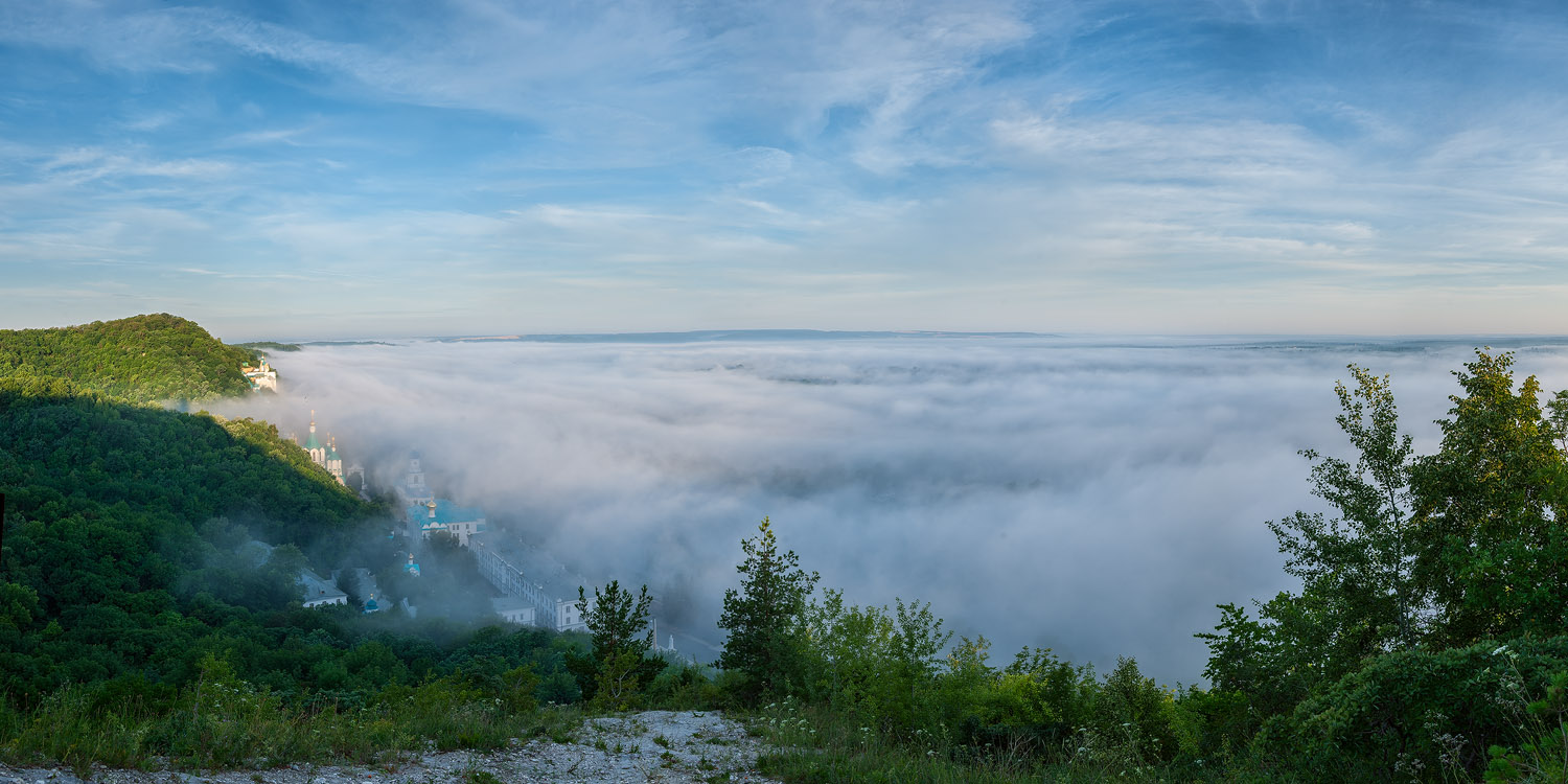 Національний природний парк «Святі Гори», Донецька область, Україна.